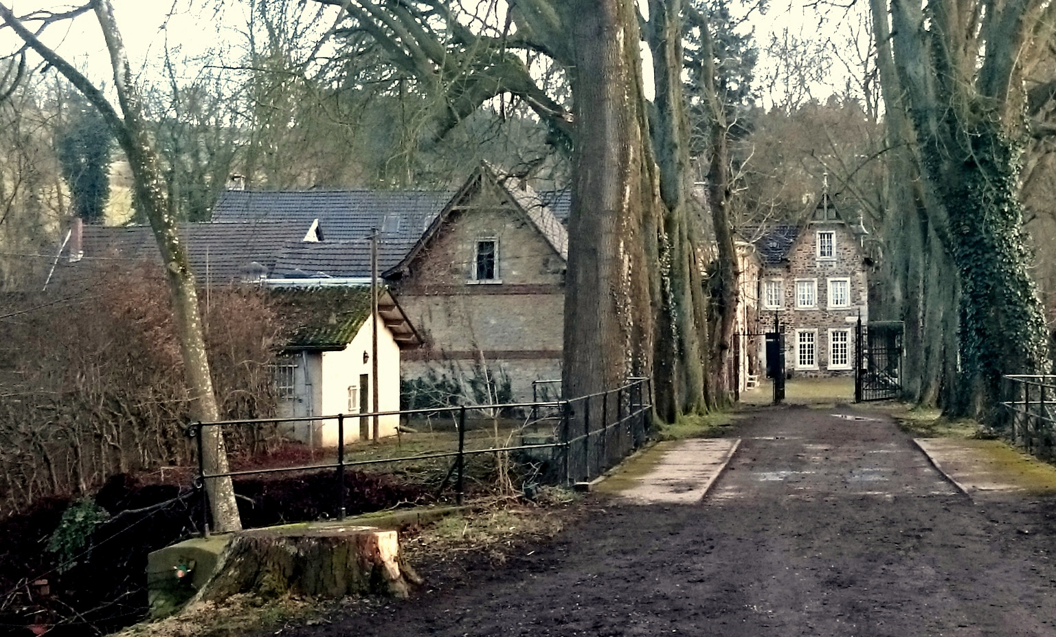 Bearbeitung gemäß freier Lizenz des Fotos von BBKurt